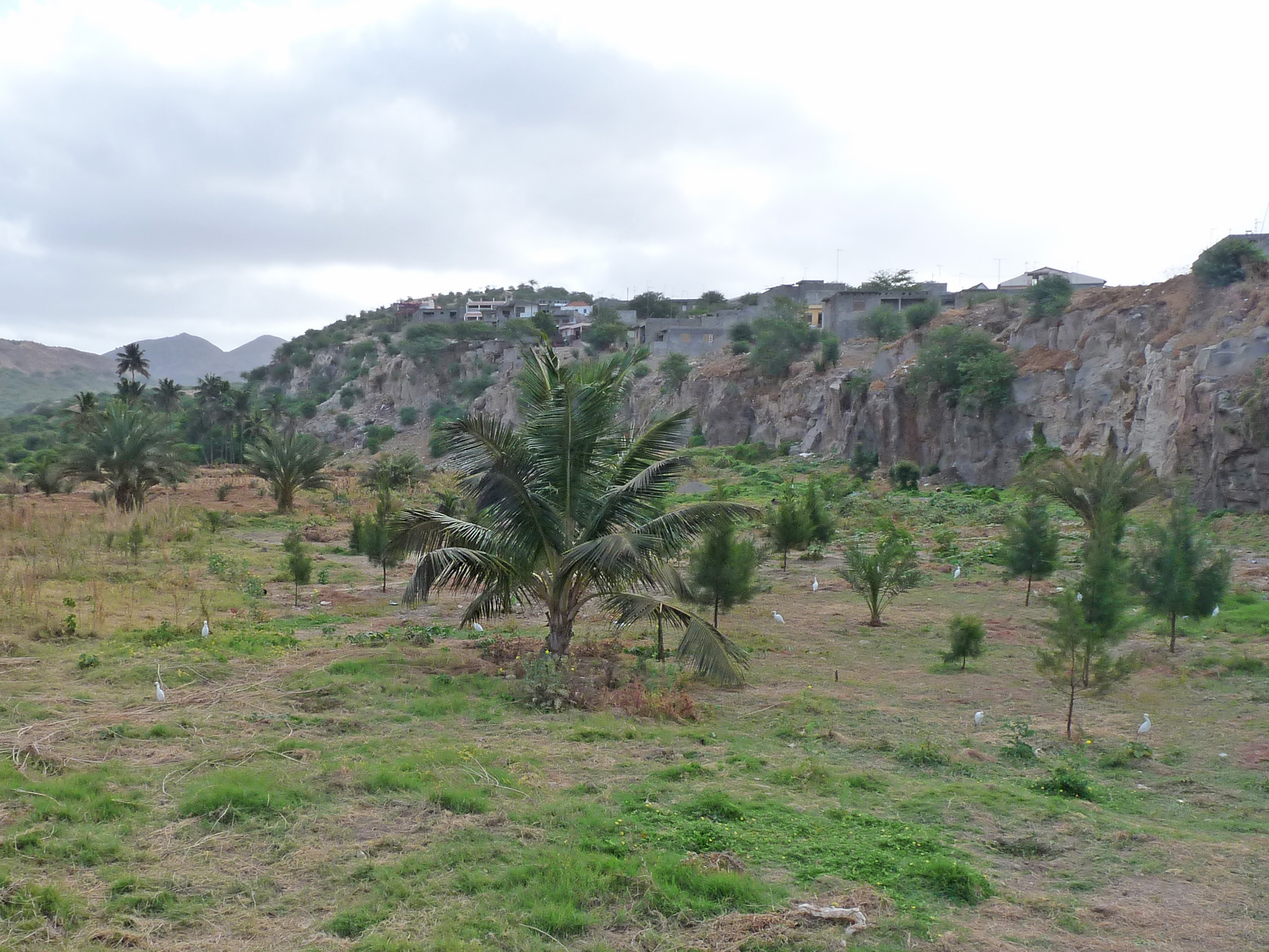 Tarrafal (île de Santiago,Cap-Vert) : aigrettes